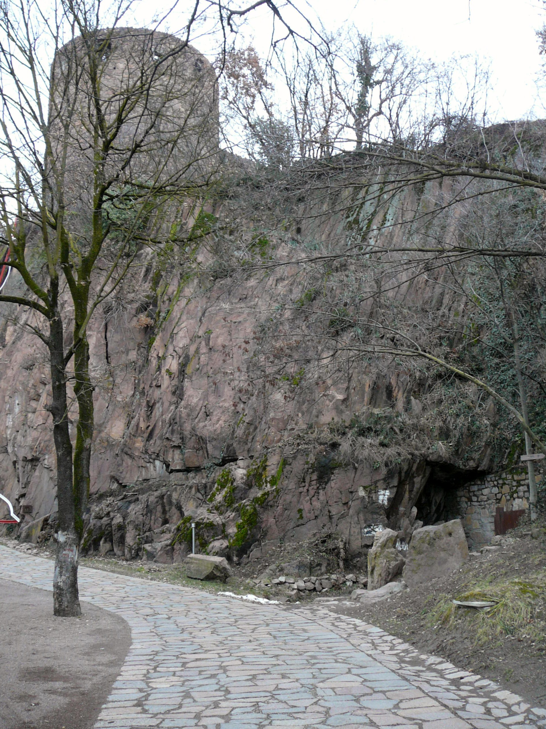 Opera 16, sbarramento Bolzano sud